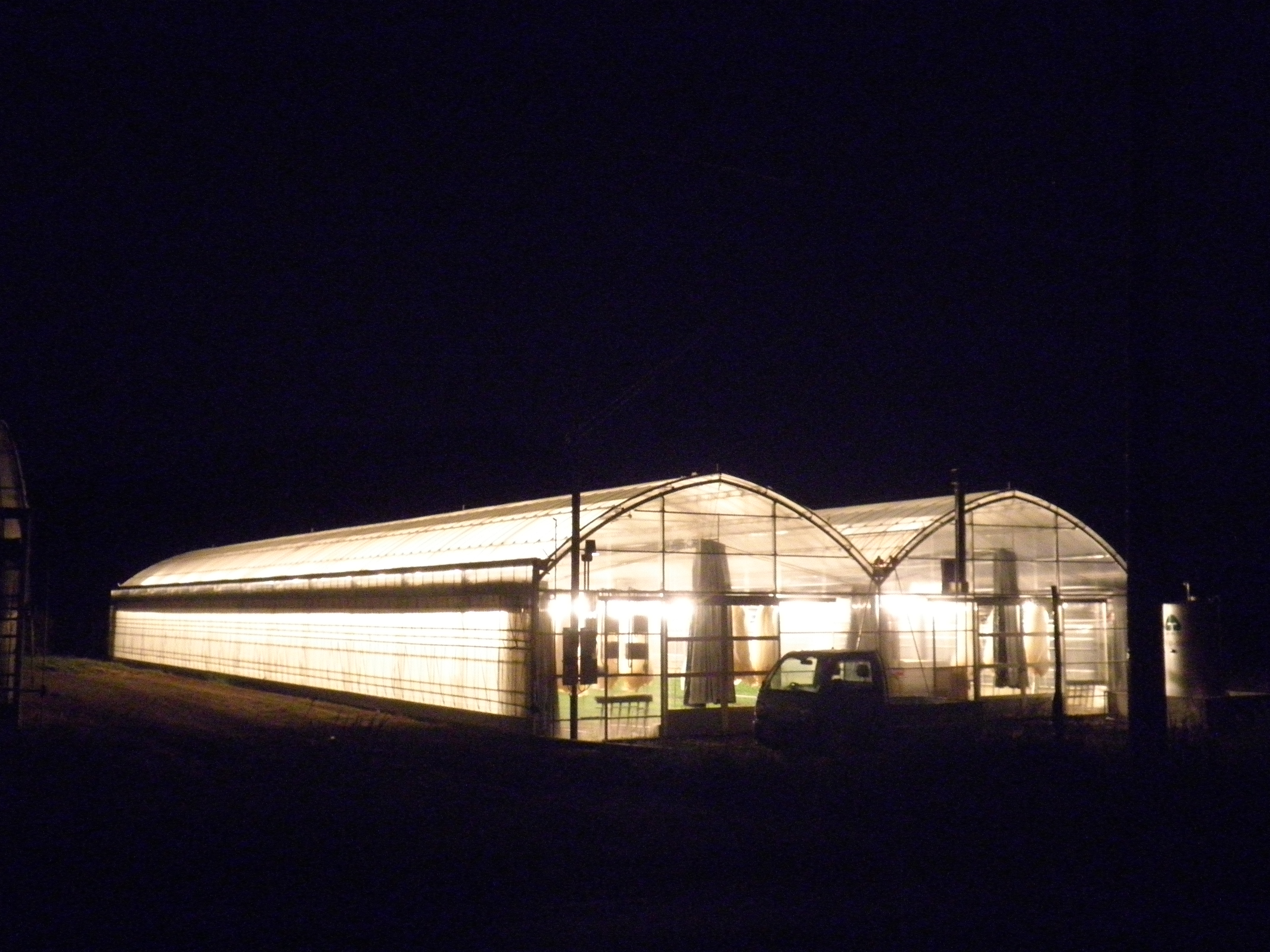 愛知県田原市にある電照菊のビニールハウス。赤羽根町域で撮影。